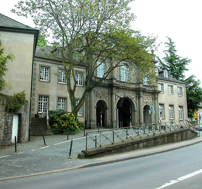 Die Einfahrt in die Werden Abtei er: Entrance to Werden abbey